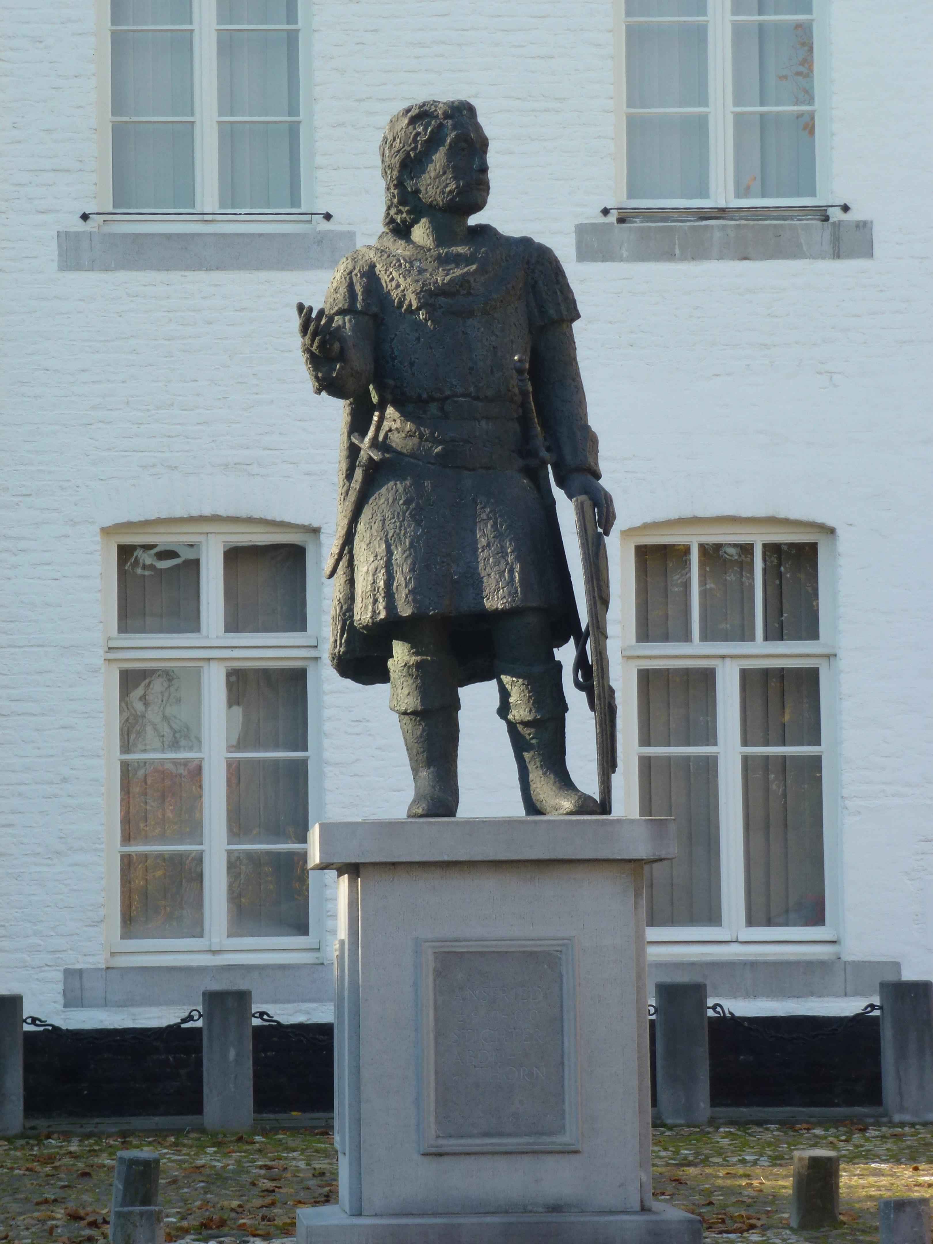 Standbeeld van Ansfried, stichter van de abdij van het Limburgse stadje Thorn